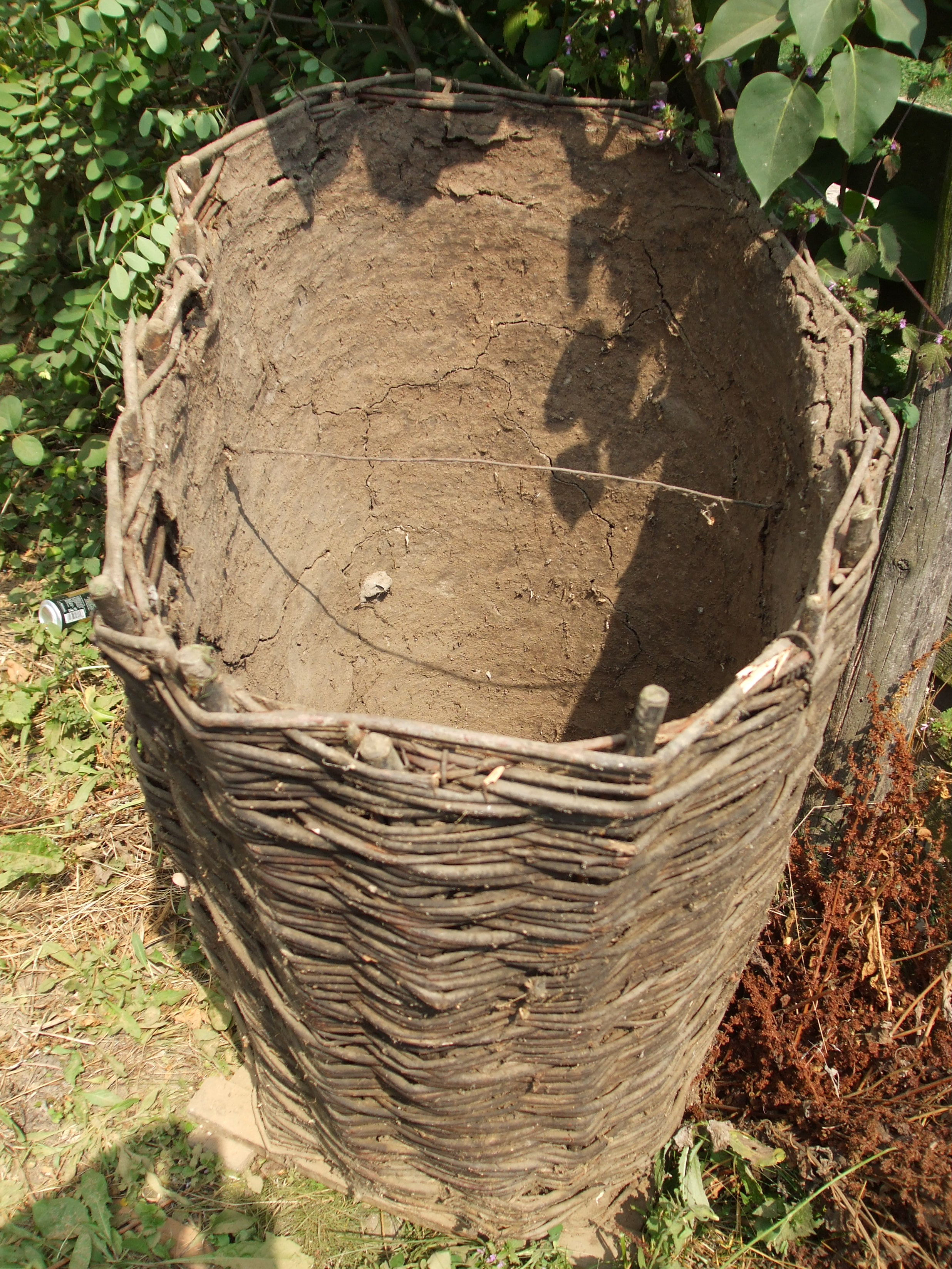 Aruncuta, hambar pentru grâu - din nuiele si căptuşit cu balegă, utilizat de săteni în perioada iobagiei şi până în zilele noastre.